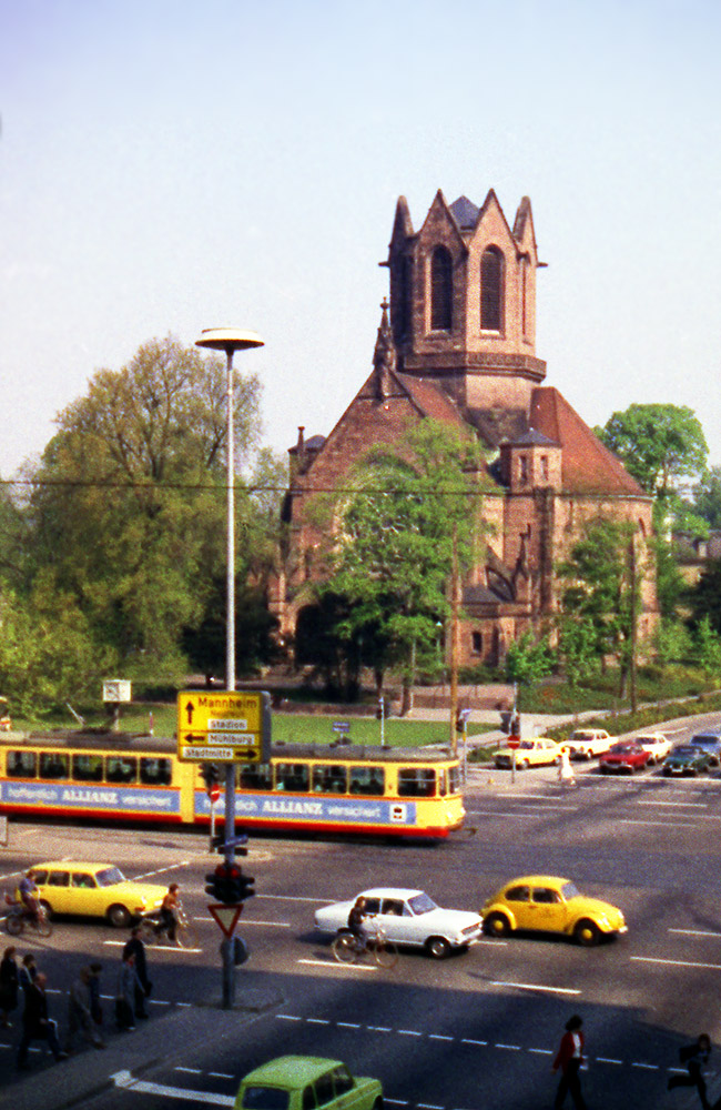 Christuskirche mit altem Turmhelm